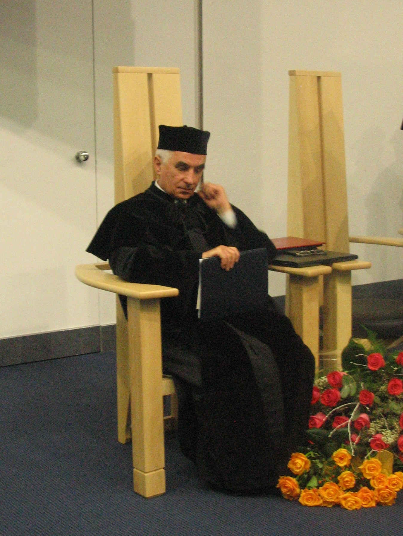 Andrzej Ziębik na uroczystości wręczenia Doktoratu Honoris Causa Jerzemu Buzkowi 10 grudnia 2007